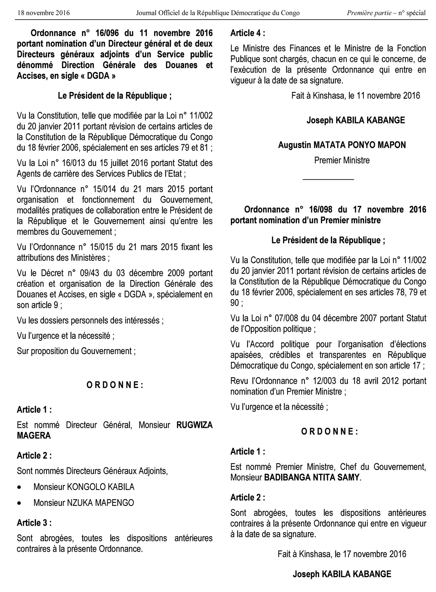 Extrait de la nomination de Monsieur Déo Rugwiza Magera